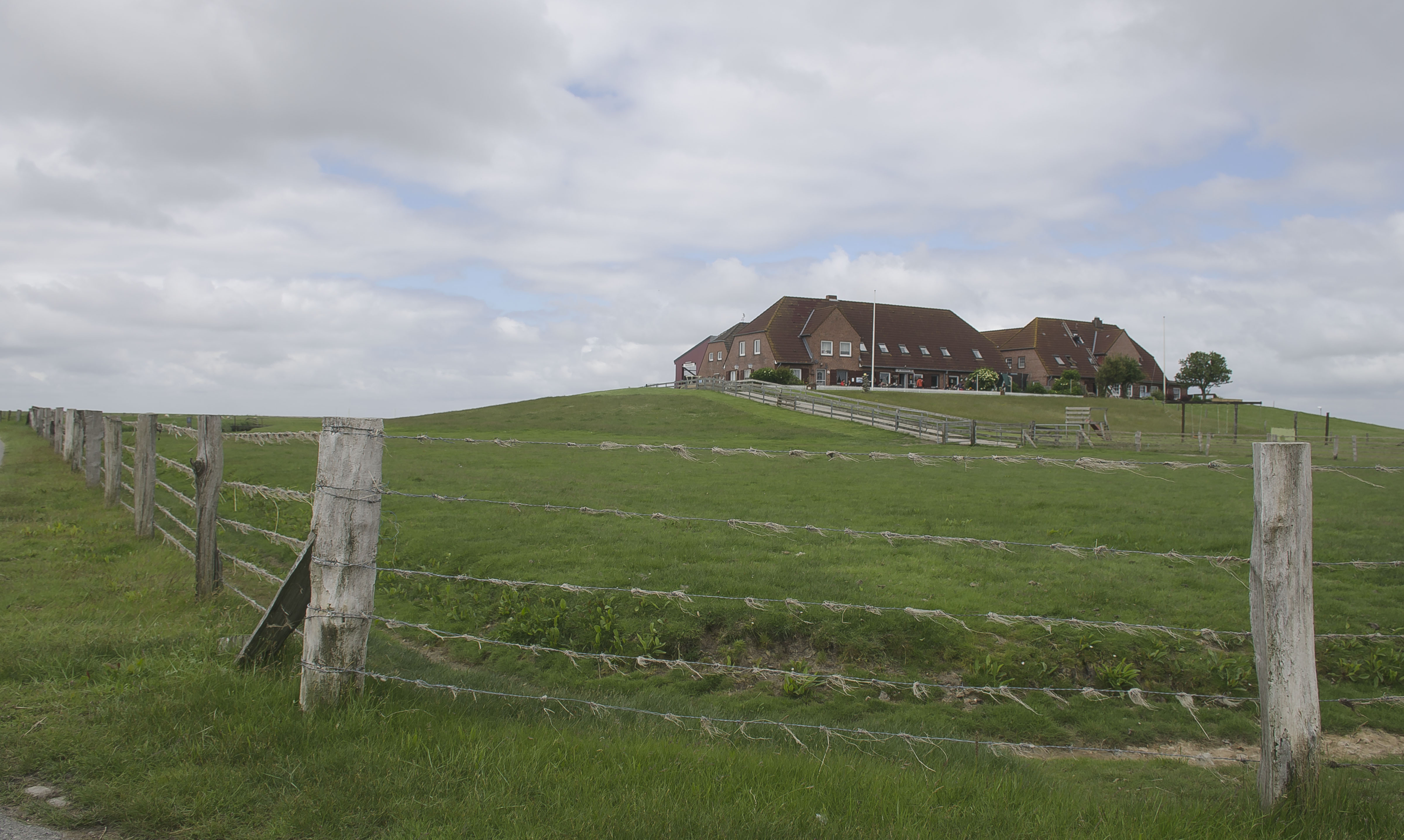 Hallig Nordstrandischmoor